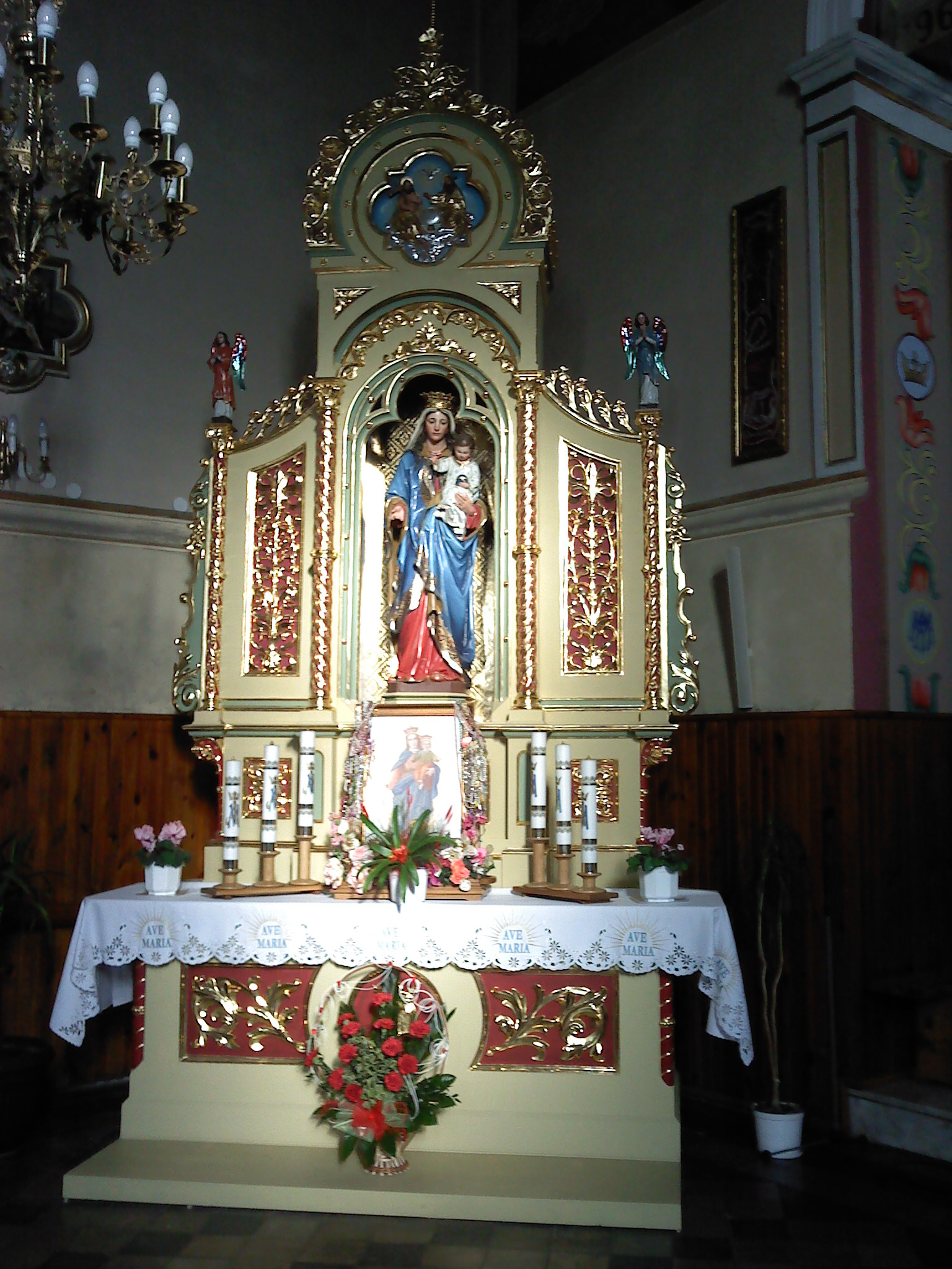 Ołtarz Boczny MB